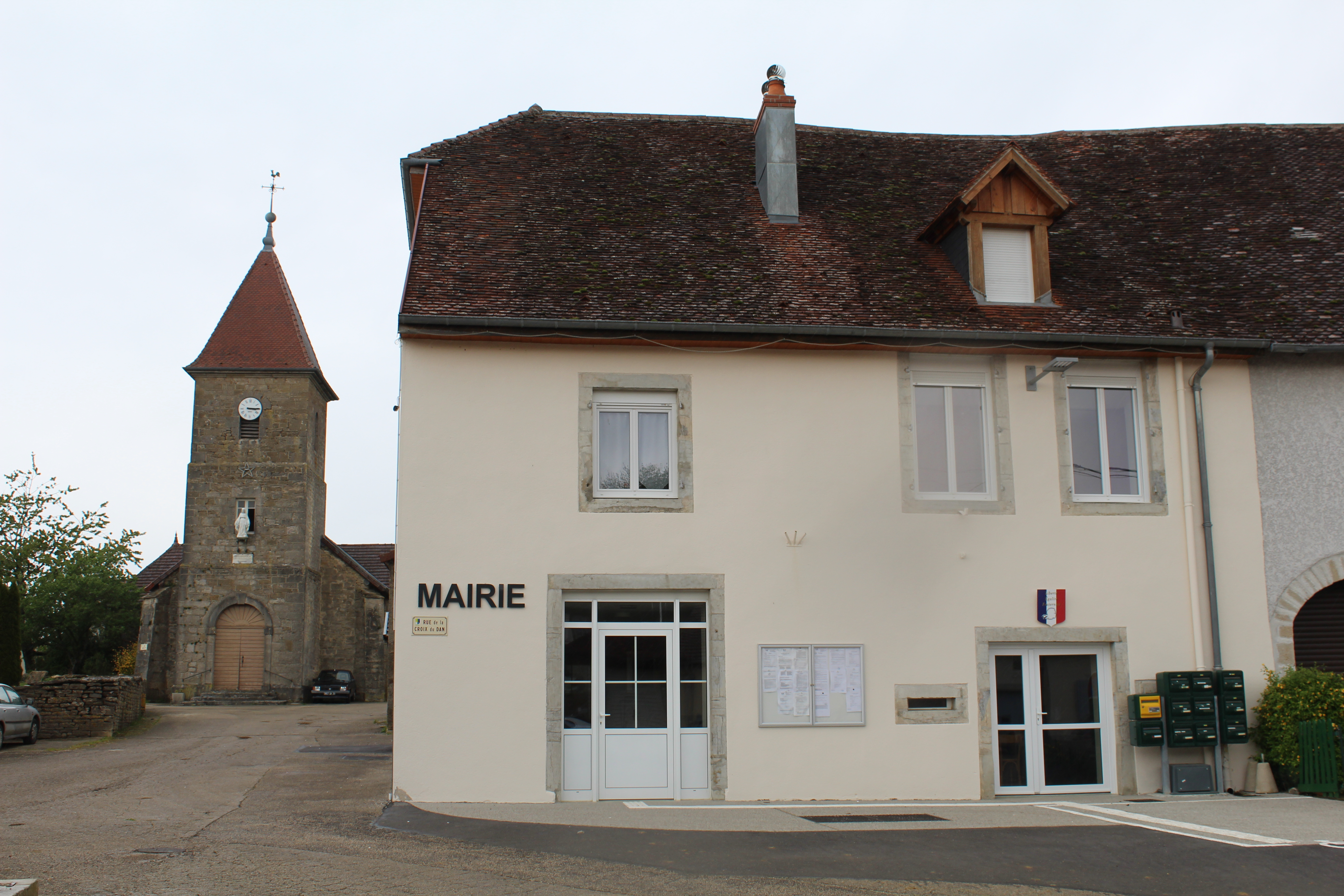 Mairie de Barretaine.